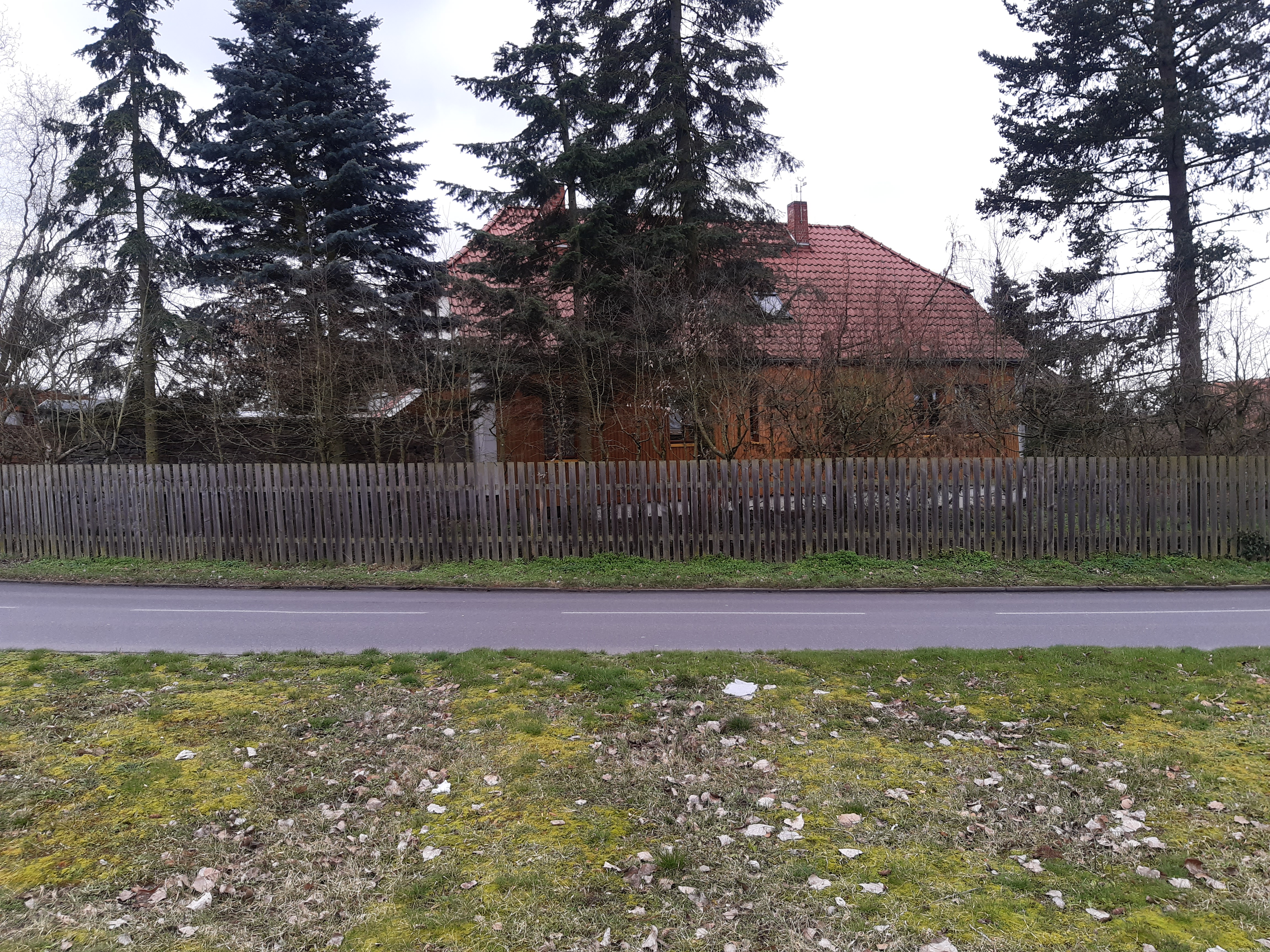 Forsthaus